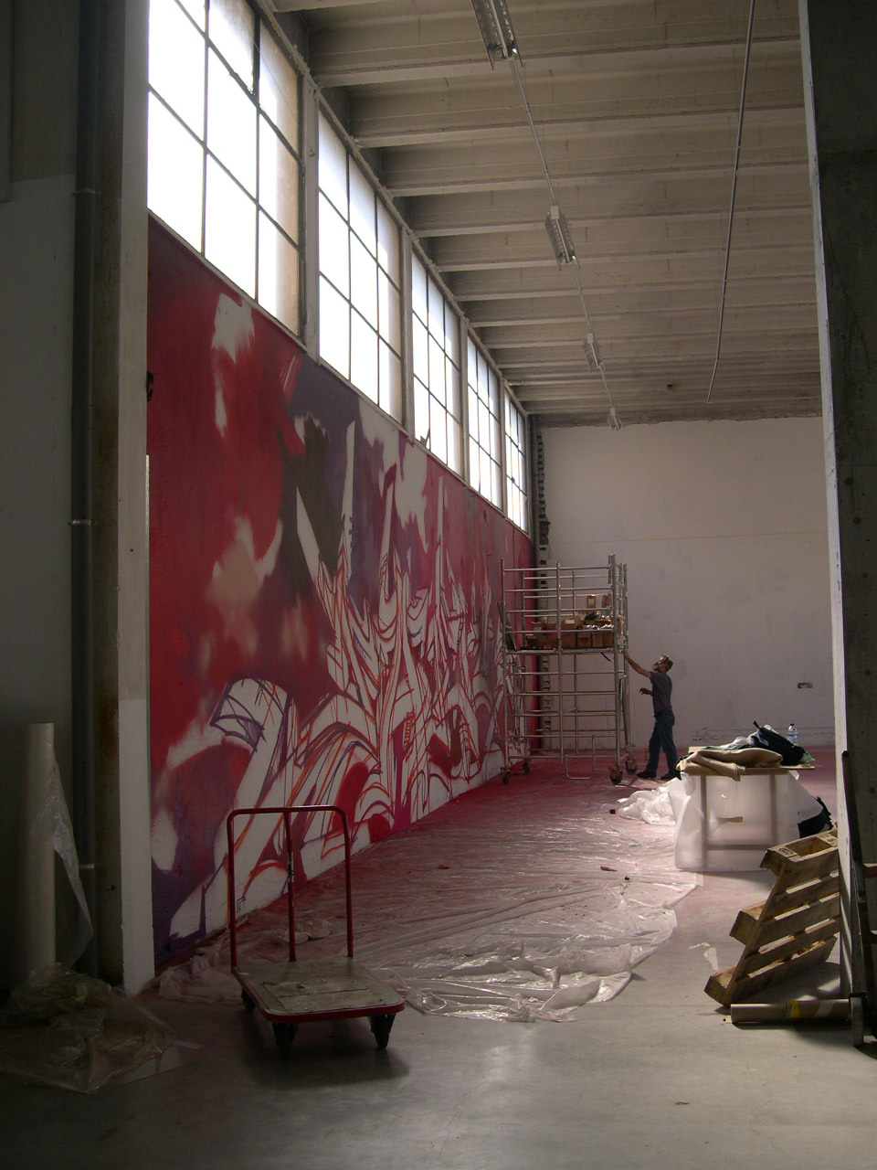 auteur de la photo: Cyberic. Darco au Palais de Tokyo, pour l'ouverture du festival d'automne en 2003